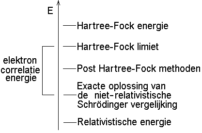 Relatieve ligging berekende energie-niveau's.